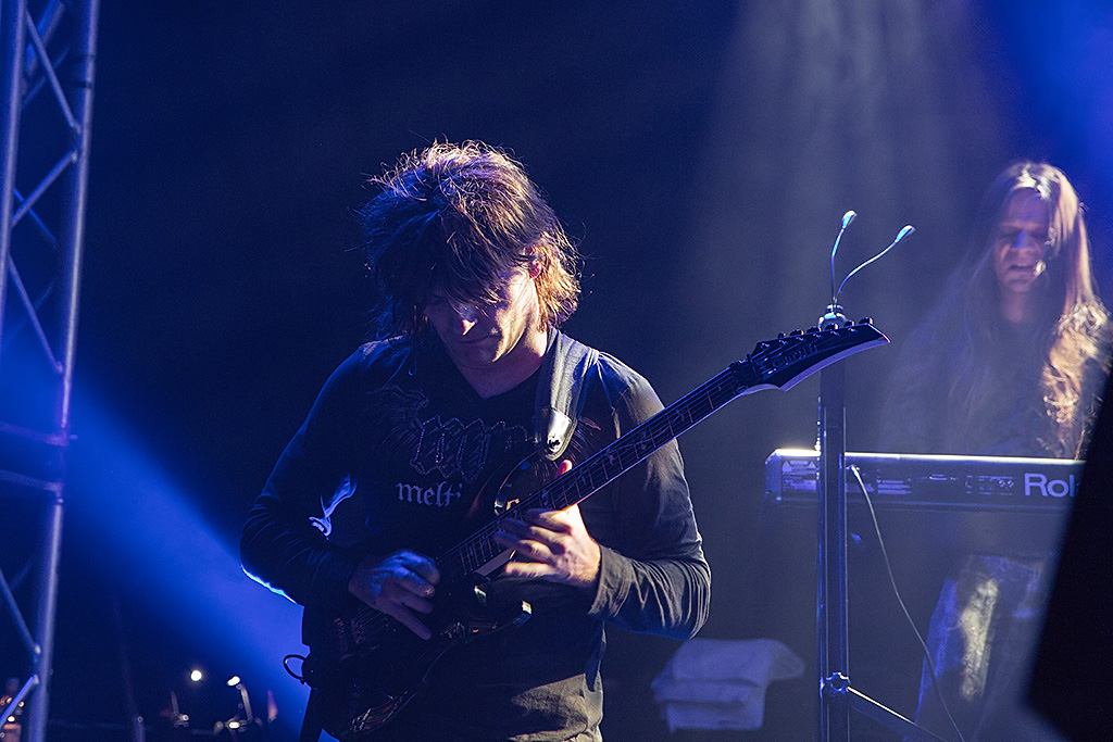 Rhapsody - 1.12.2012 Musichall Geiselwind